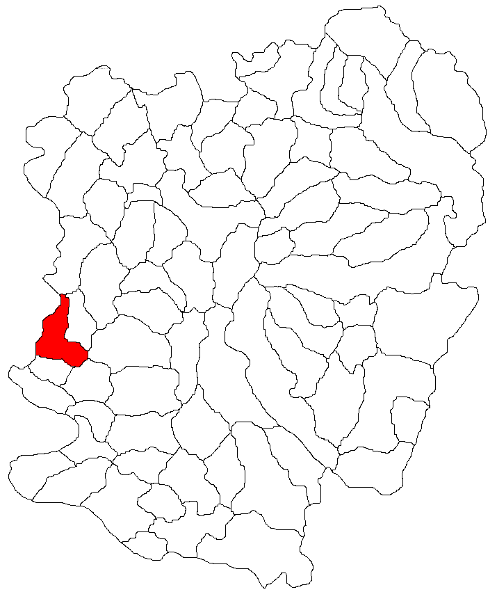 Categorie:Hărţi ale judeţului Caraş-Severin